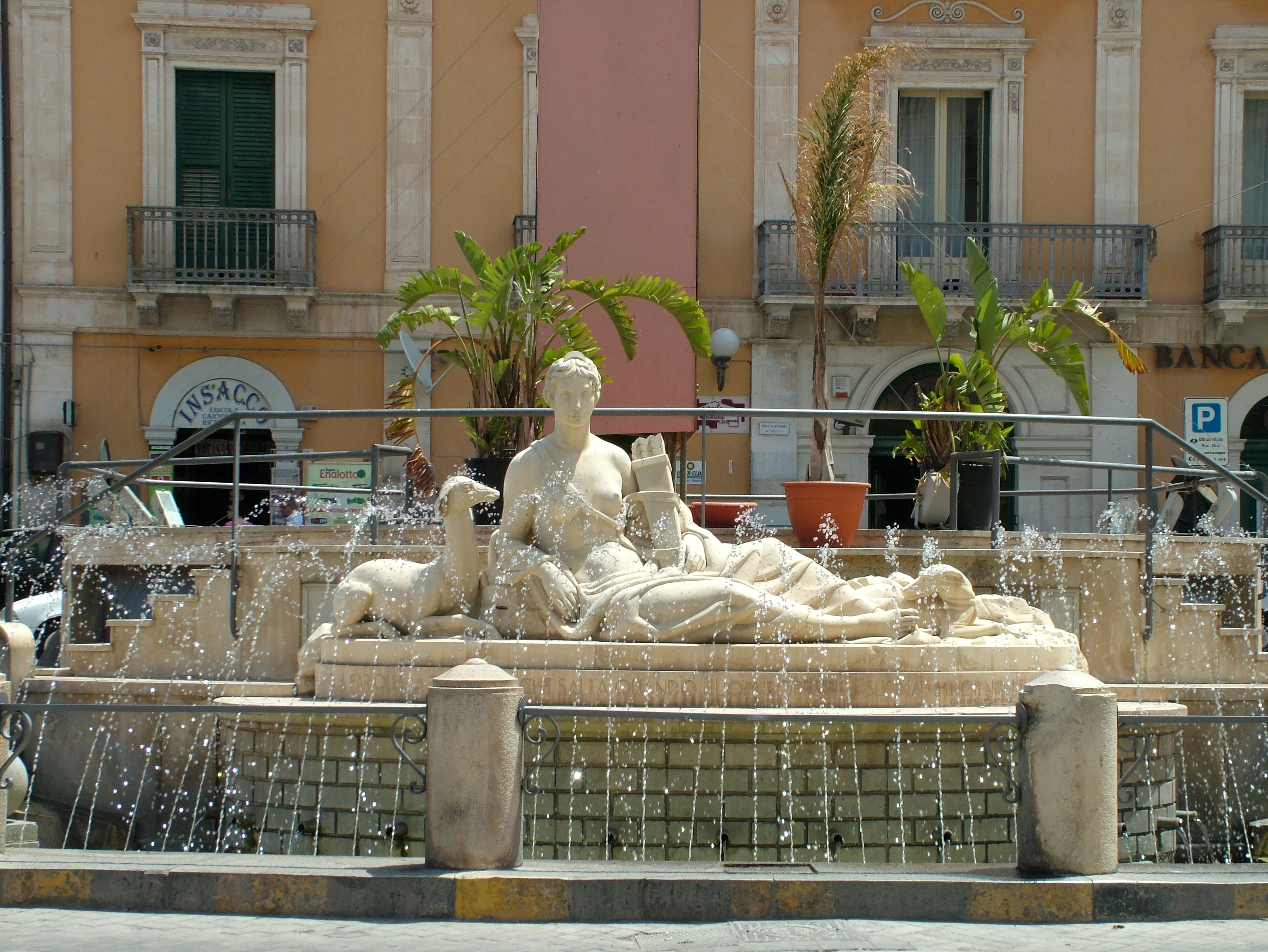 Comiso, Sizilien, Fonte Diana